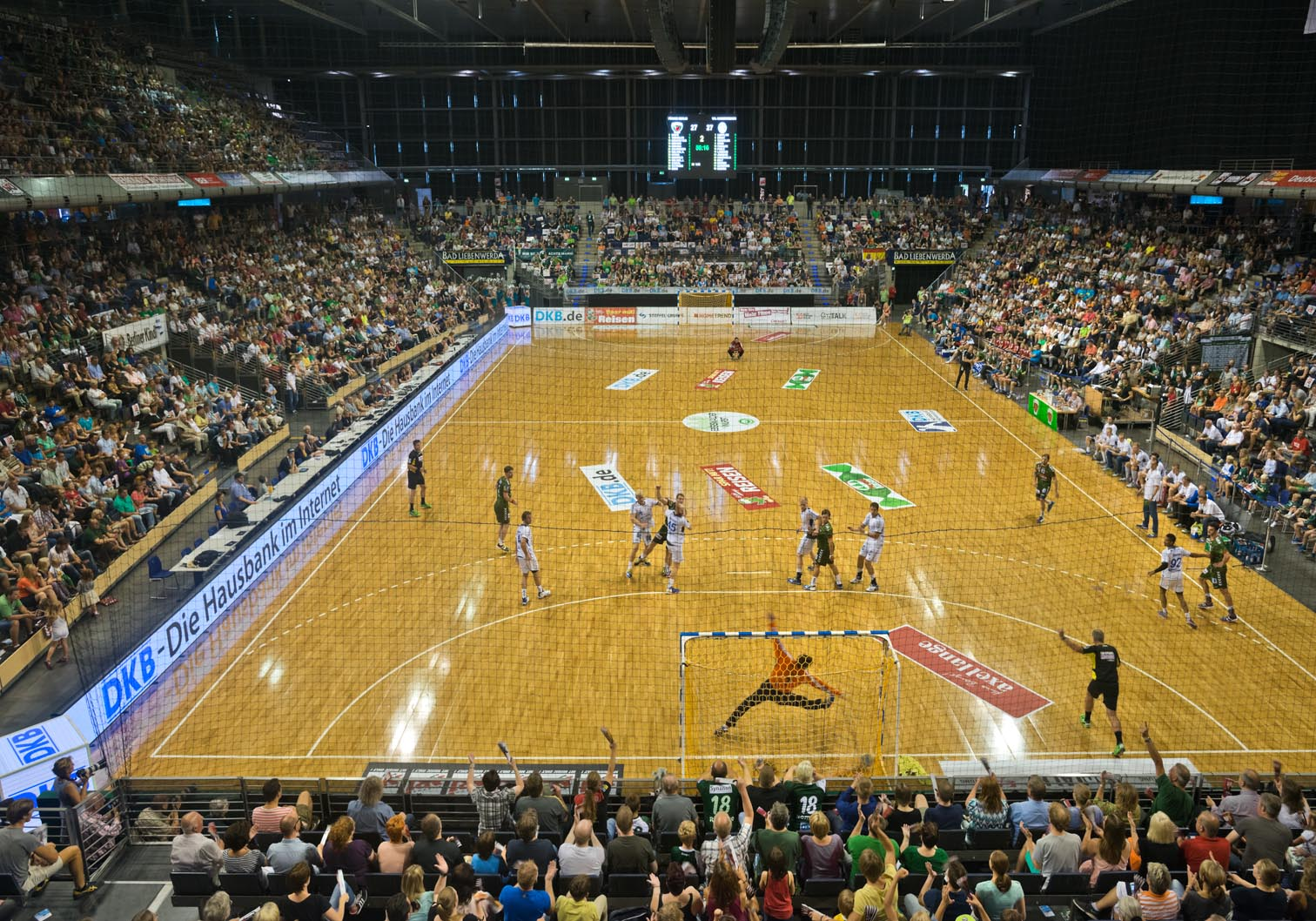 Die Füchse Berlin haben hier ebenfalls Ihren Fuchsbau.